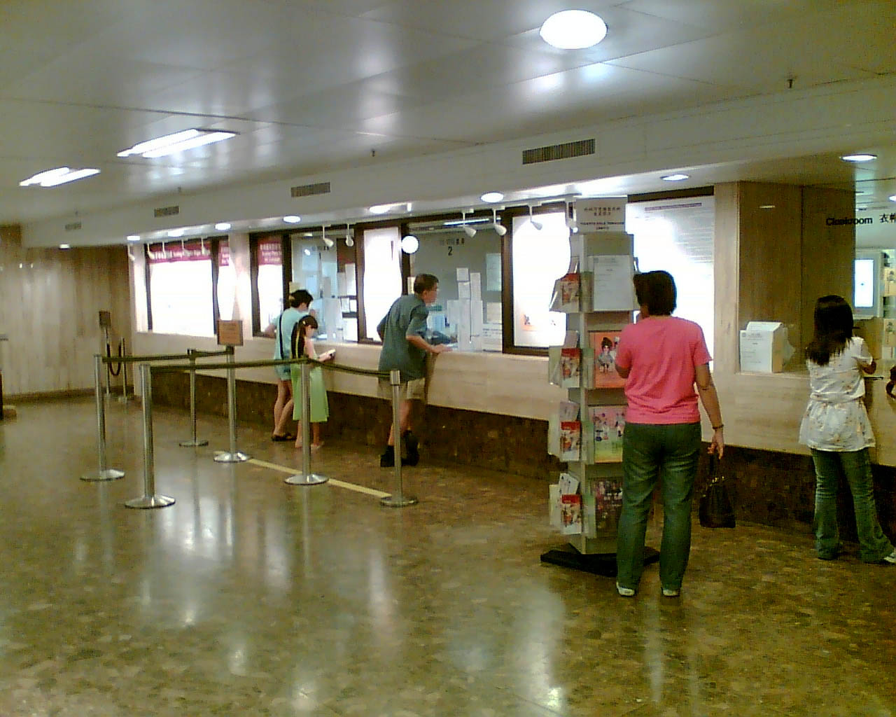 沙田大會堂售票處